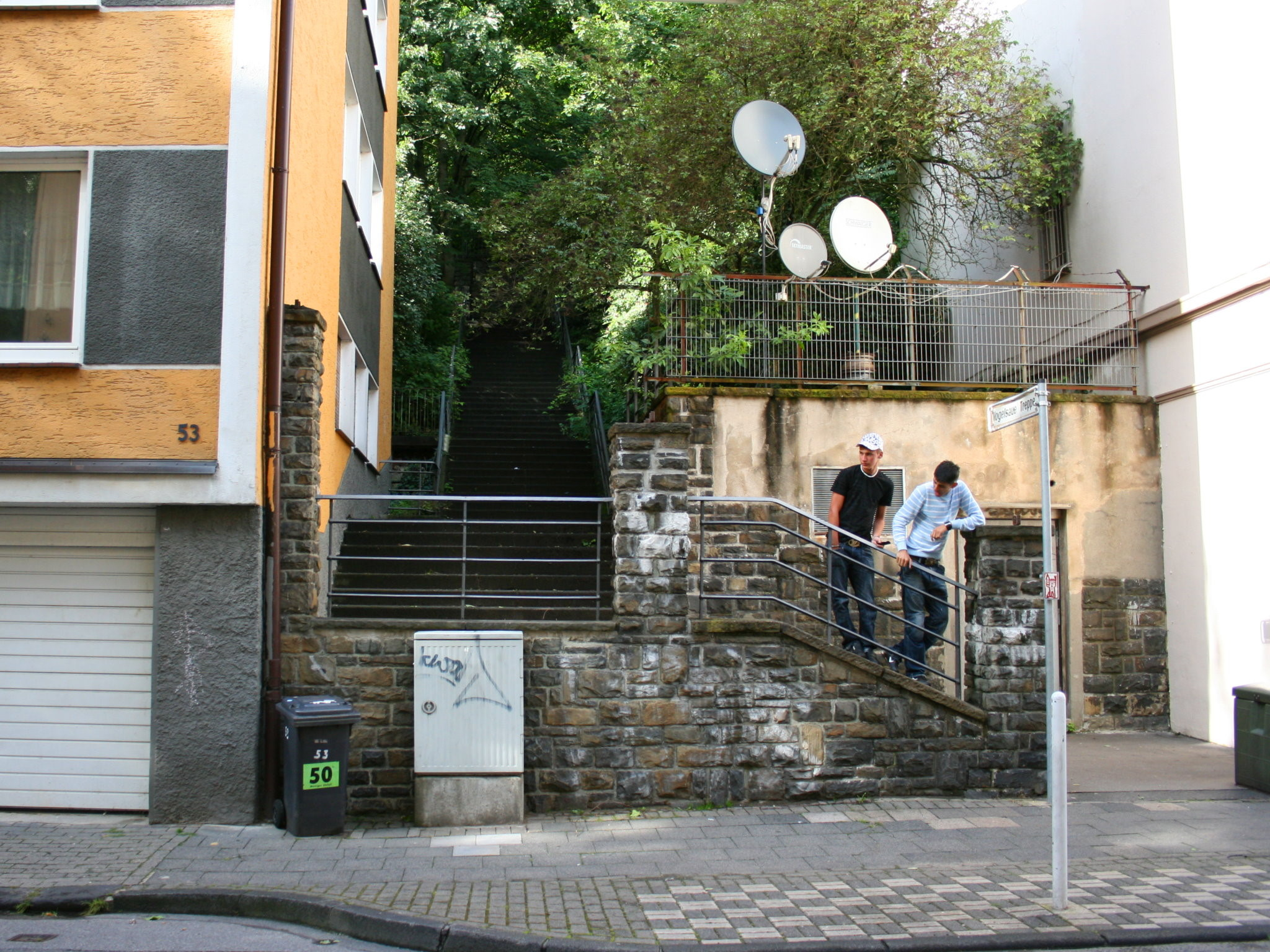 Obere Vogelsauer Treppe in Wuppertal